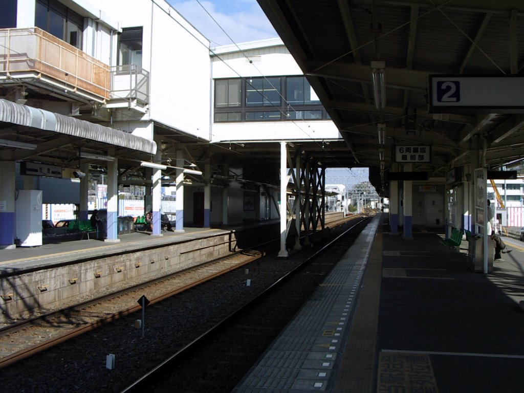 京成本線京成佐倉駅 2007年2月26日投稿者が撮影 Category:鉄道駅画像 Category:京成電鉄の画像